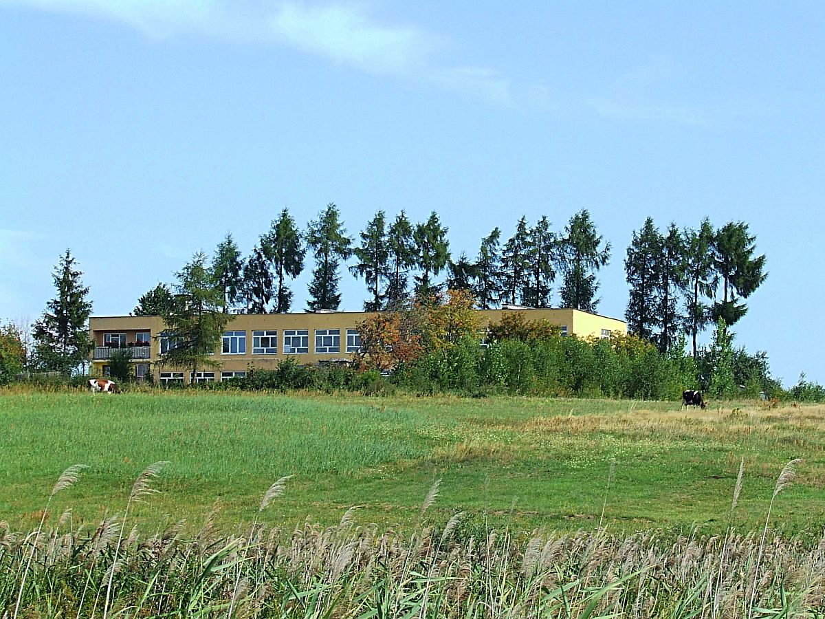 Szkoła podstawowa w Kierzu Niedzwiedzim